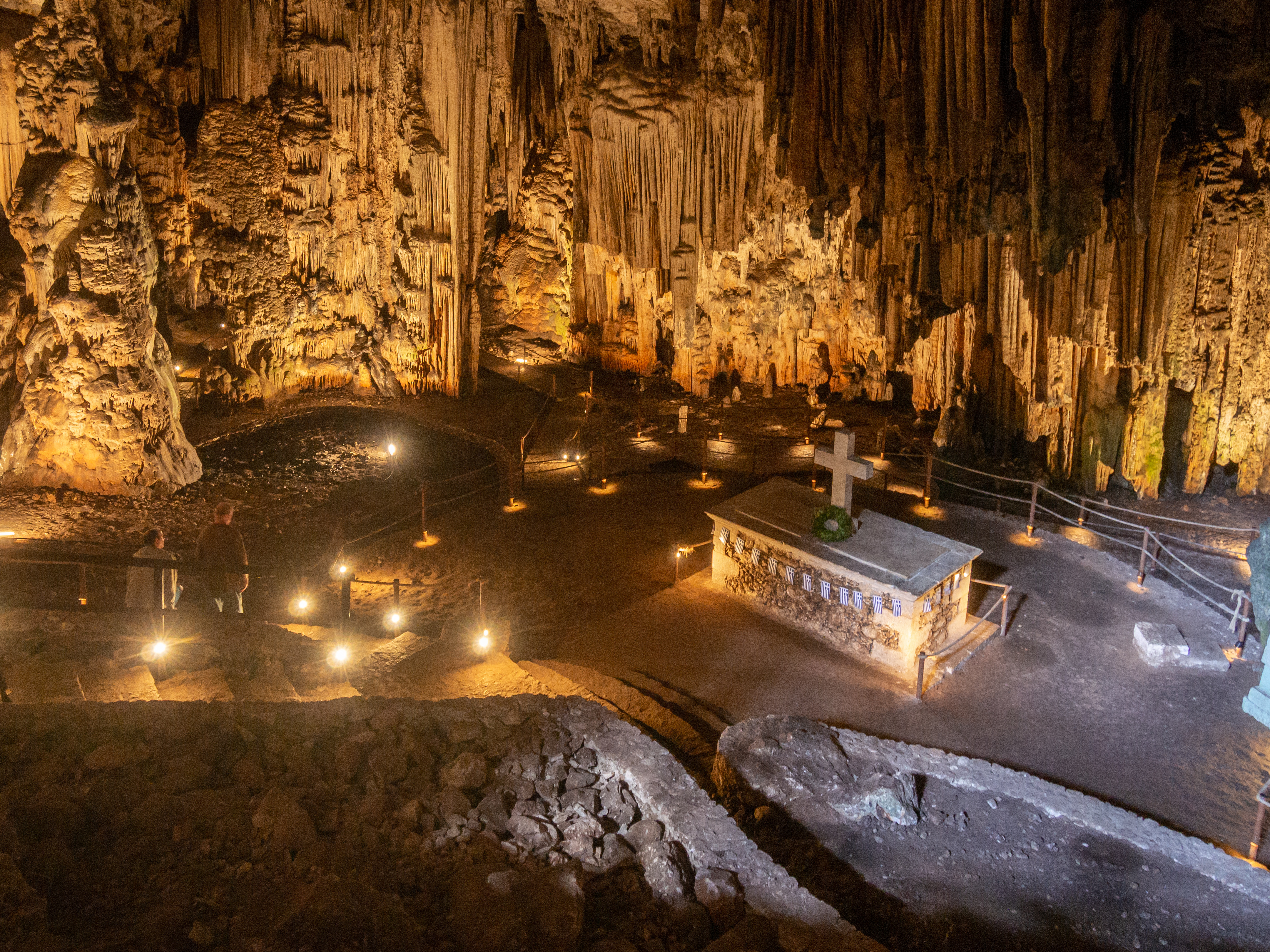 Σπήλαιο Μελιδονίου«Σπήλαιο Μελιδονίου»